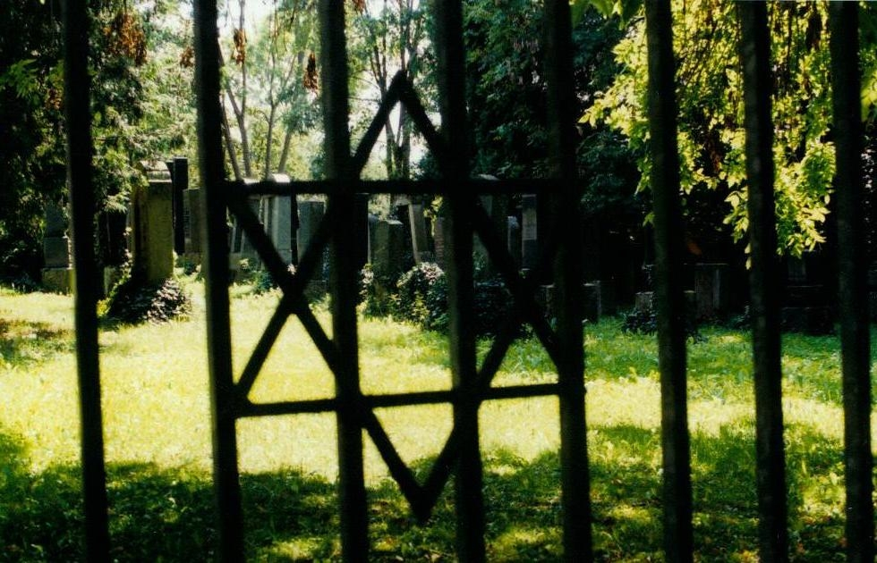 Jüdischer Friedhof Nördlingen Germany